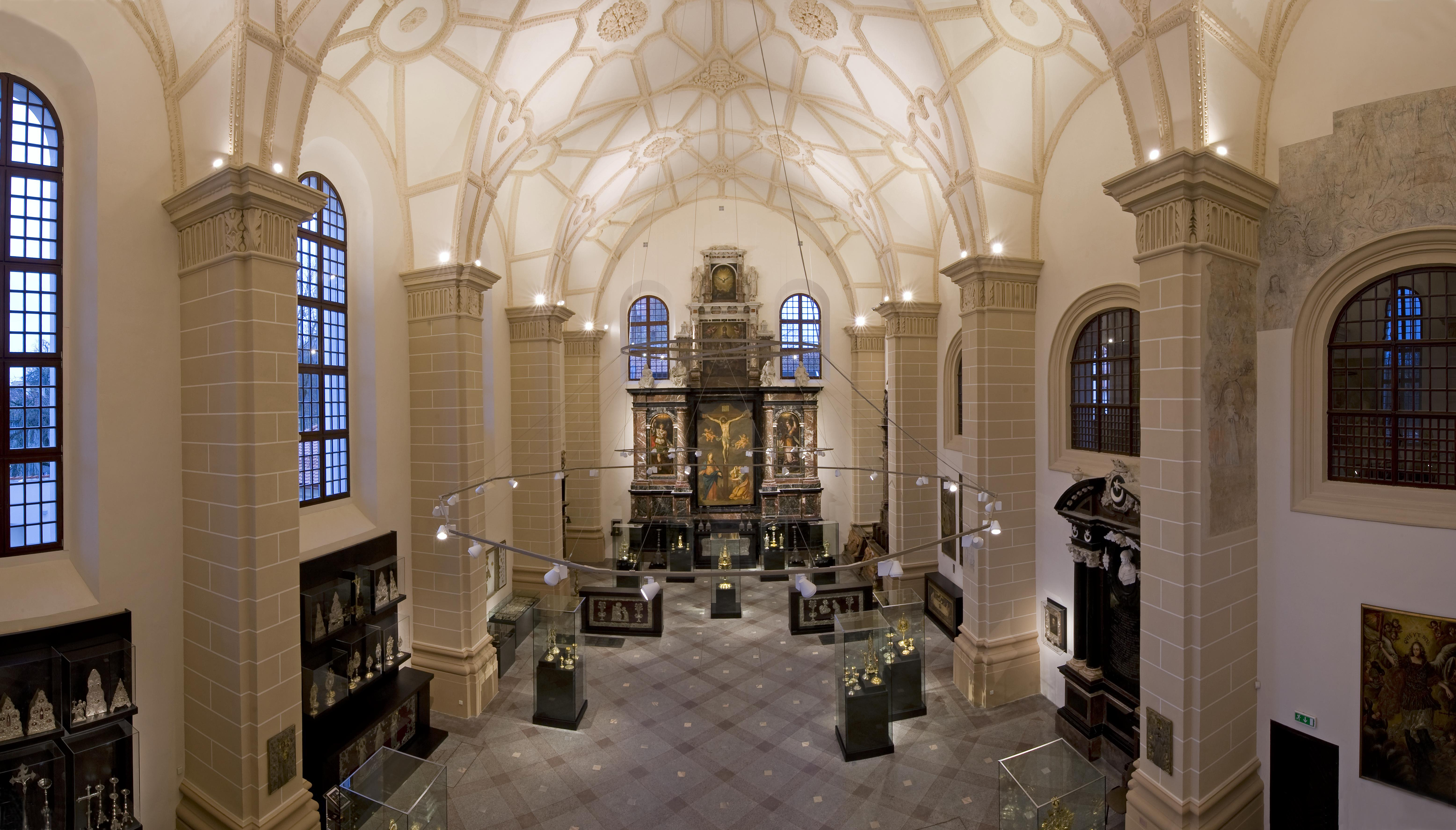 Bažnytinio paveldo muziejaus ekspozicija Šv. Mykolo bažnyčioje